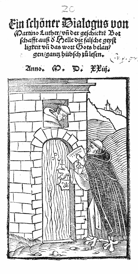 Titelblatt zu Erasmus Alberus: "Ein schöner Dialogus von Martino Luther vn? der geschickt? Botschafft auß d' Helle die falsche geystligkeit vn? das wort Gots belangen : ganz hübsch zu lesen", 1523